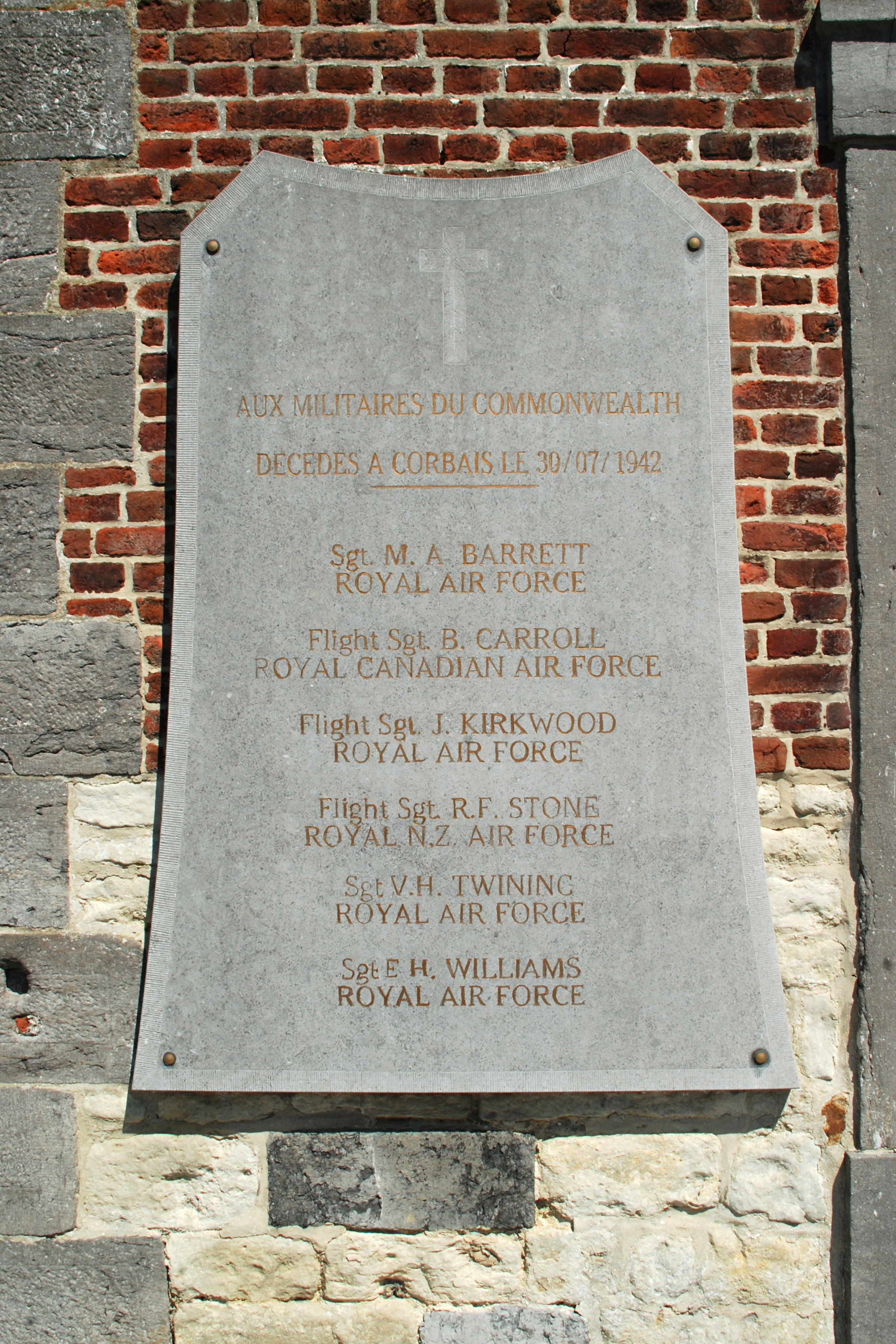 Belgique - Brabant wallon - Mont-Saint-Guibert - Église Saint-Pierre de Corbais